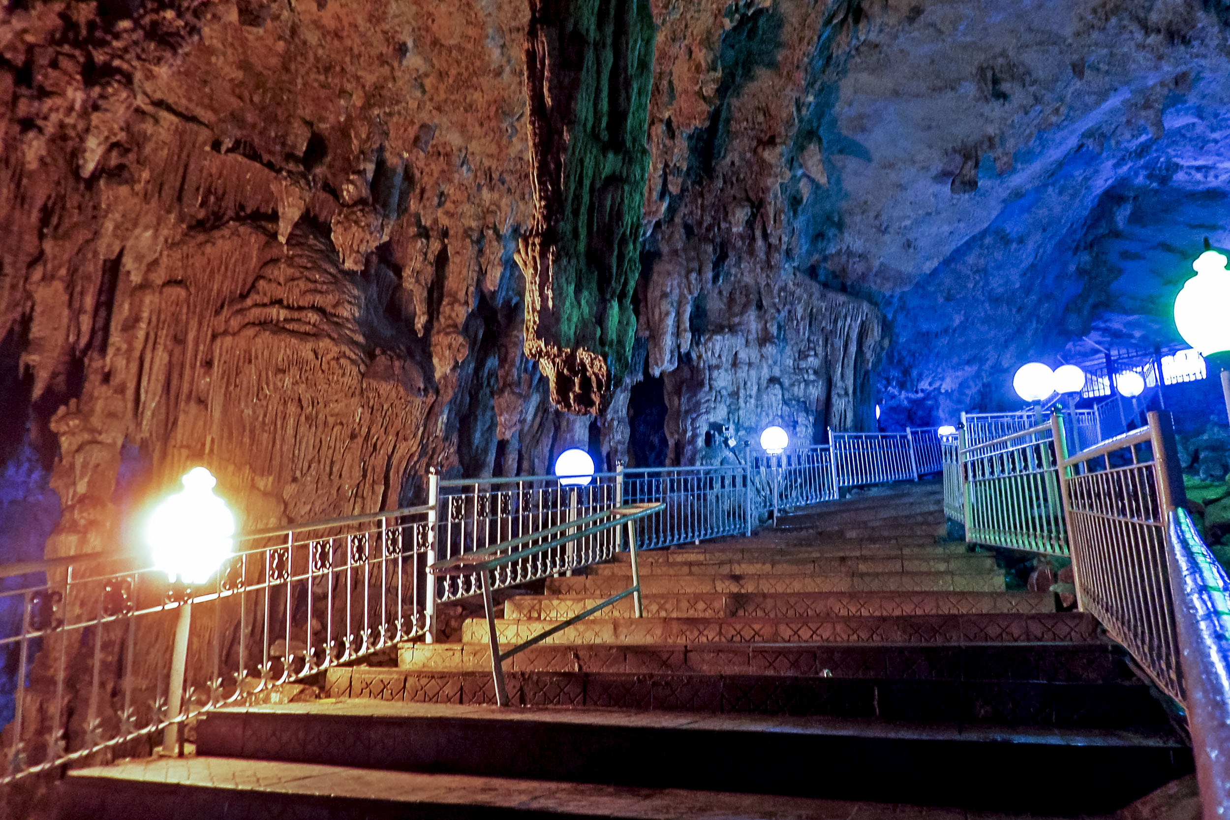 Ain Fezza - grotte عين فزة - المغارة